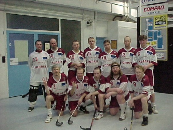 Paras joukkue 1998-99